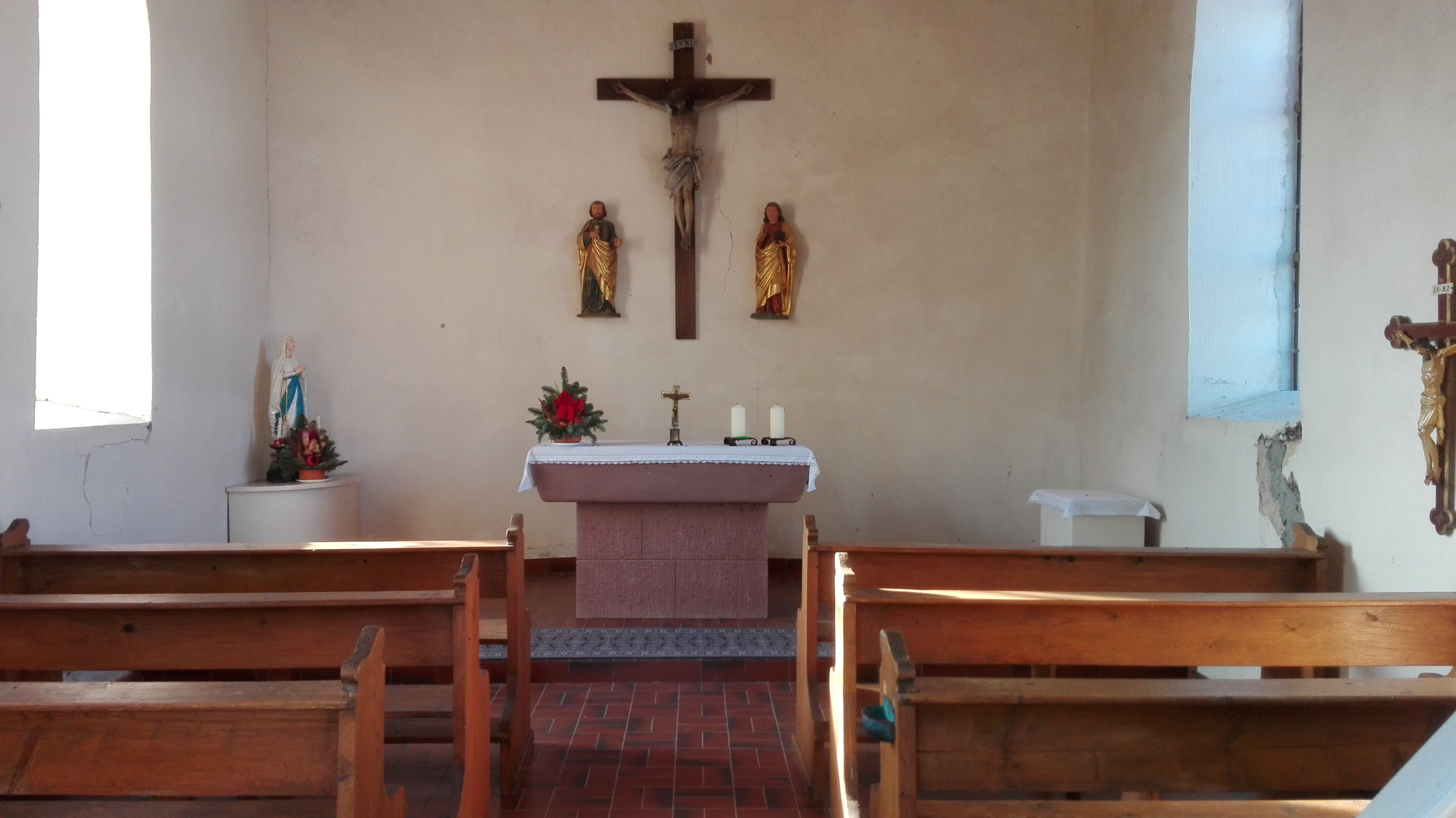 Die Marienkapelle in Hof Baiertal bei Großrinderfeld im Main-Tauber-Kreis.